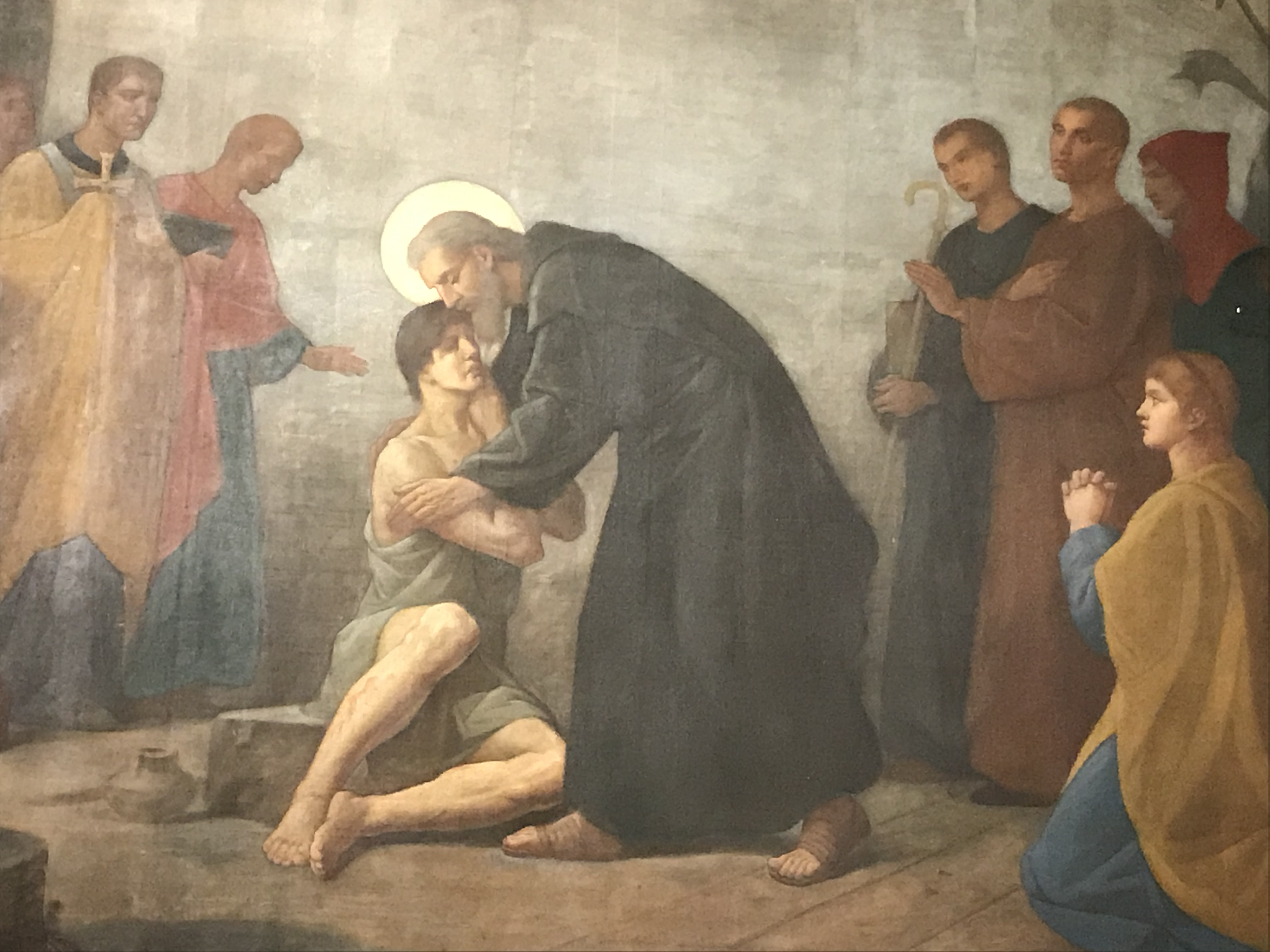 Félix Villé (1819-1907), cycle de La Vie de Saint-Martin, détail, huile sur toile, Paris, église Saint-Martin-des-Champs.